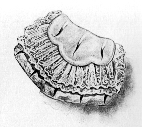 Fur prospectus